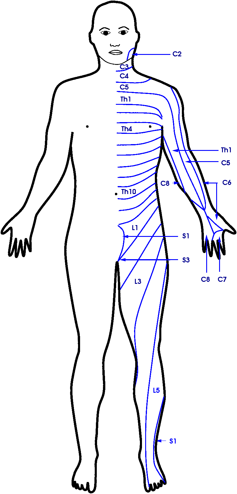 segmentale Dermatome des Menschen